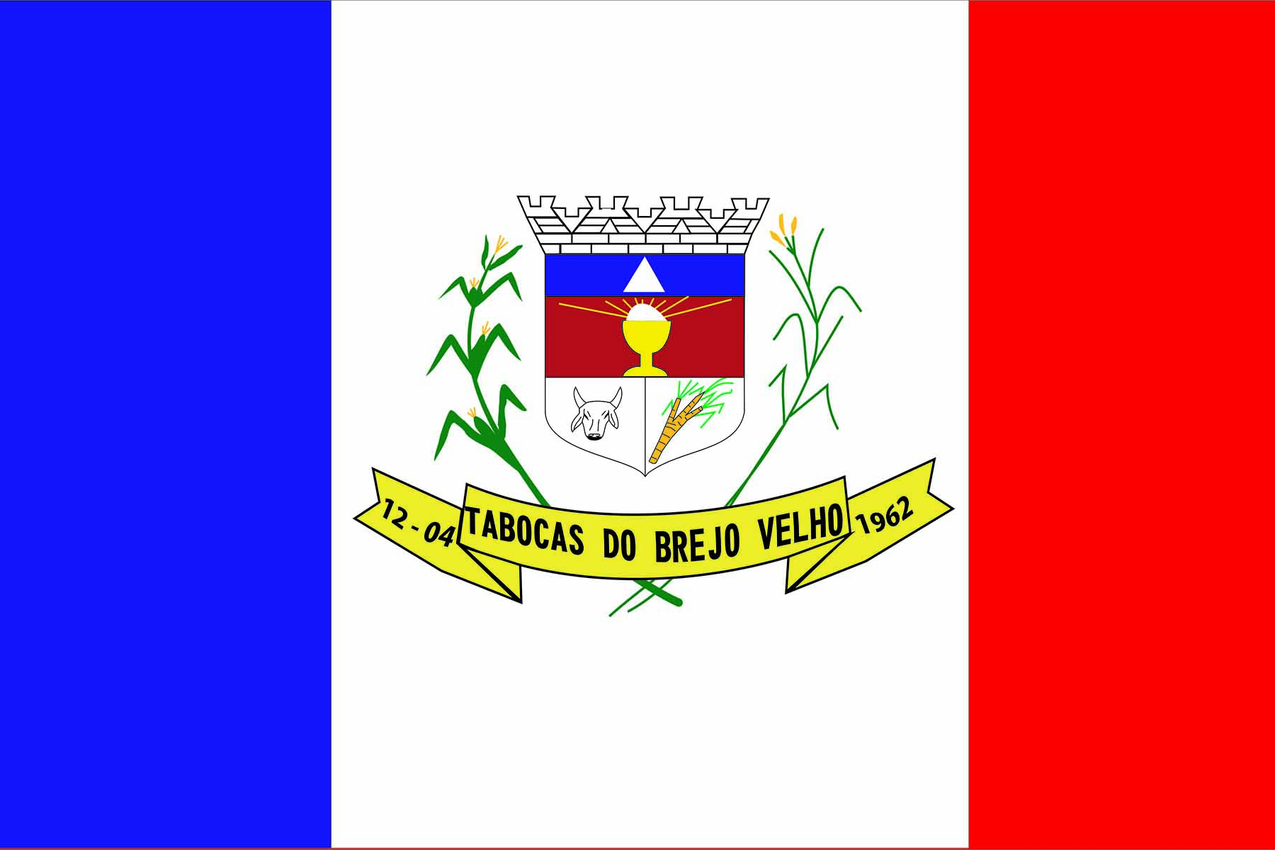 Bandeira